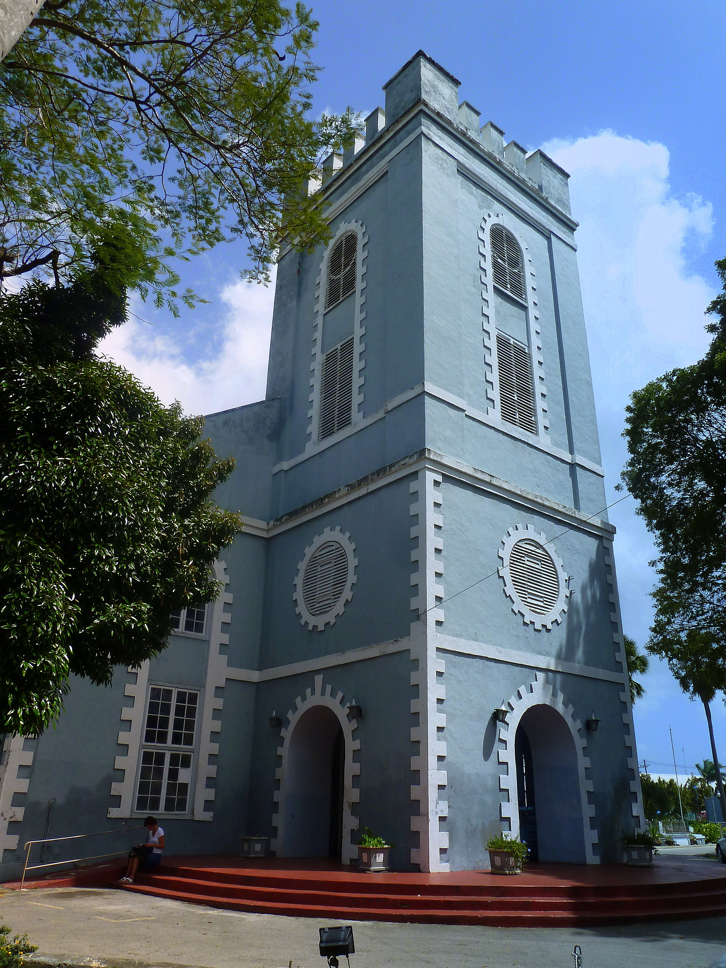 Barbados, Karibik - St. Marys Anglican Church